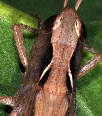 Chorthippus vagans, Männchen, Mainzer Sand, Rheinland-Pfalz, Deutschland